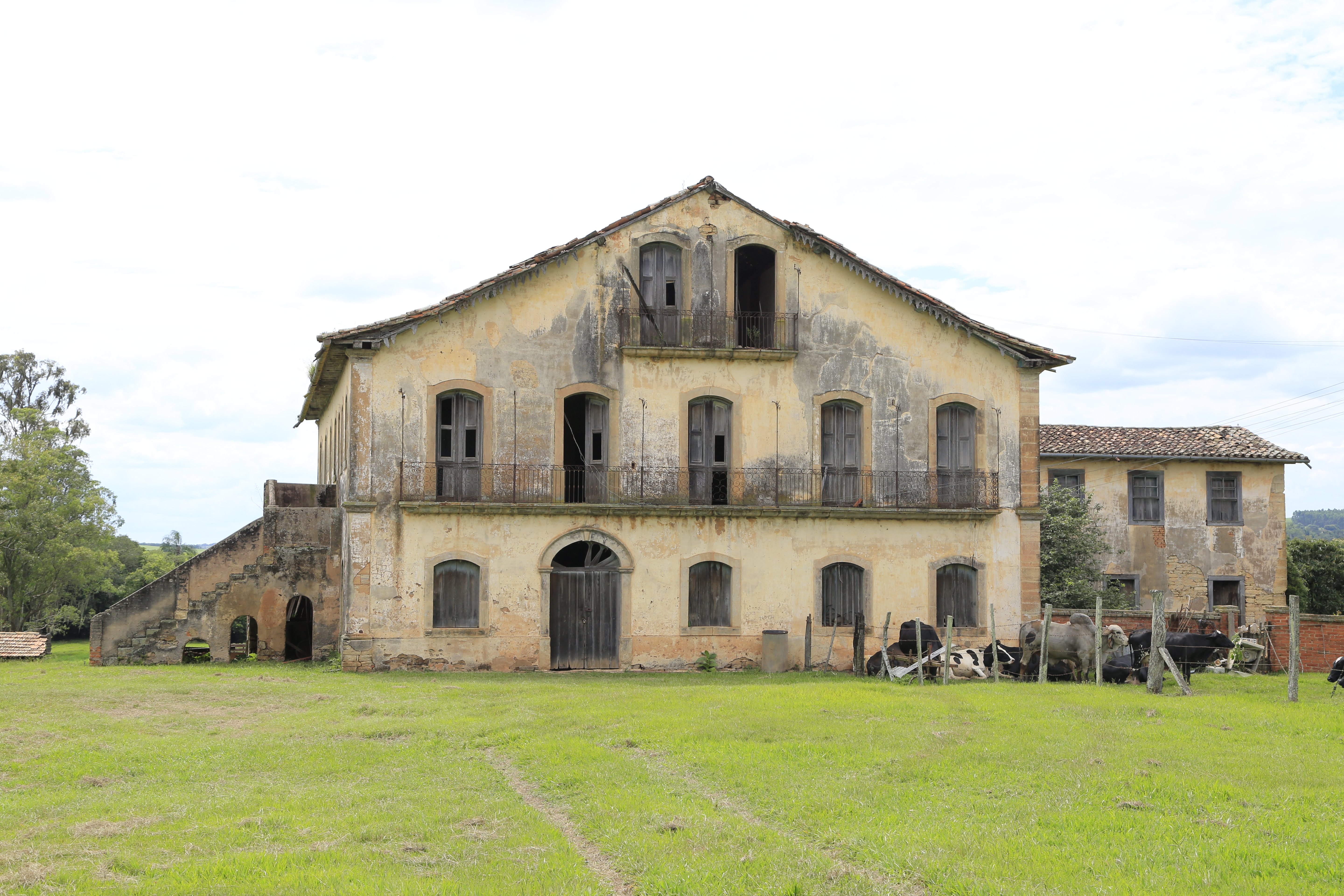 SEDE DA FAZENDA GRÃO MOGOL